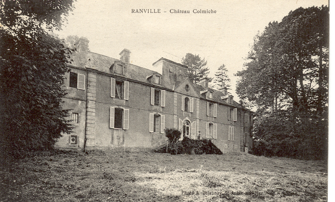 Carte postale du Château Colmiche